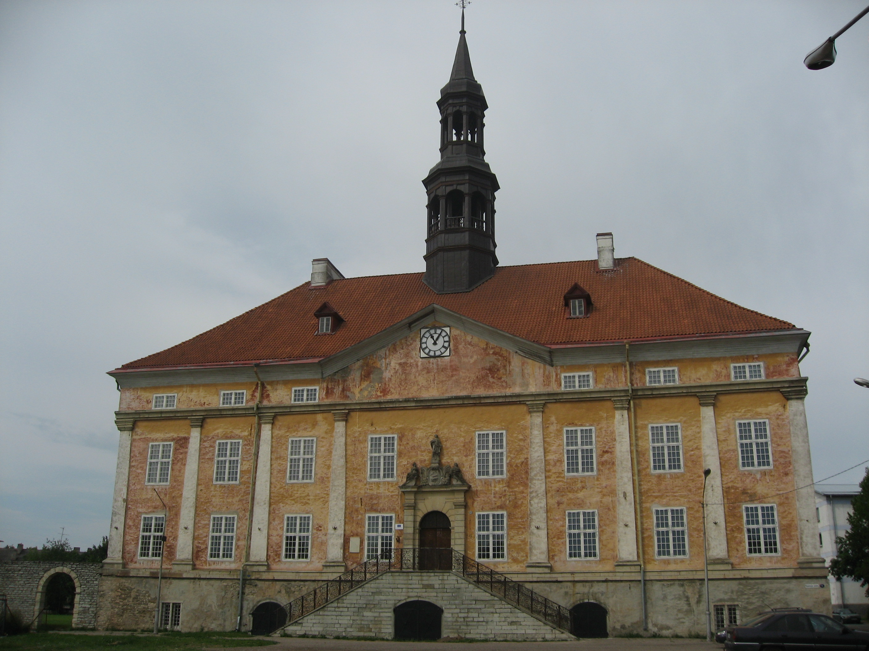 Narva raekoda